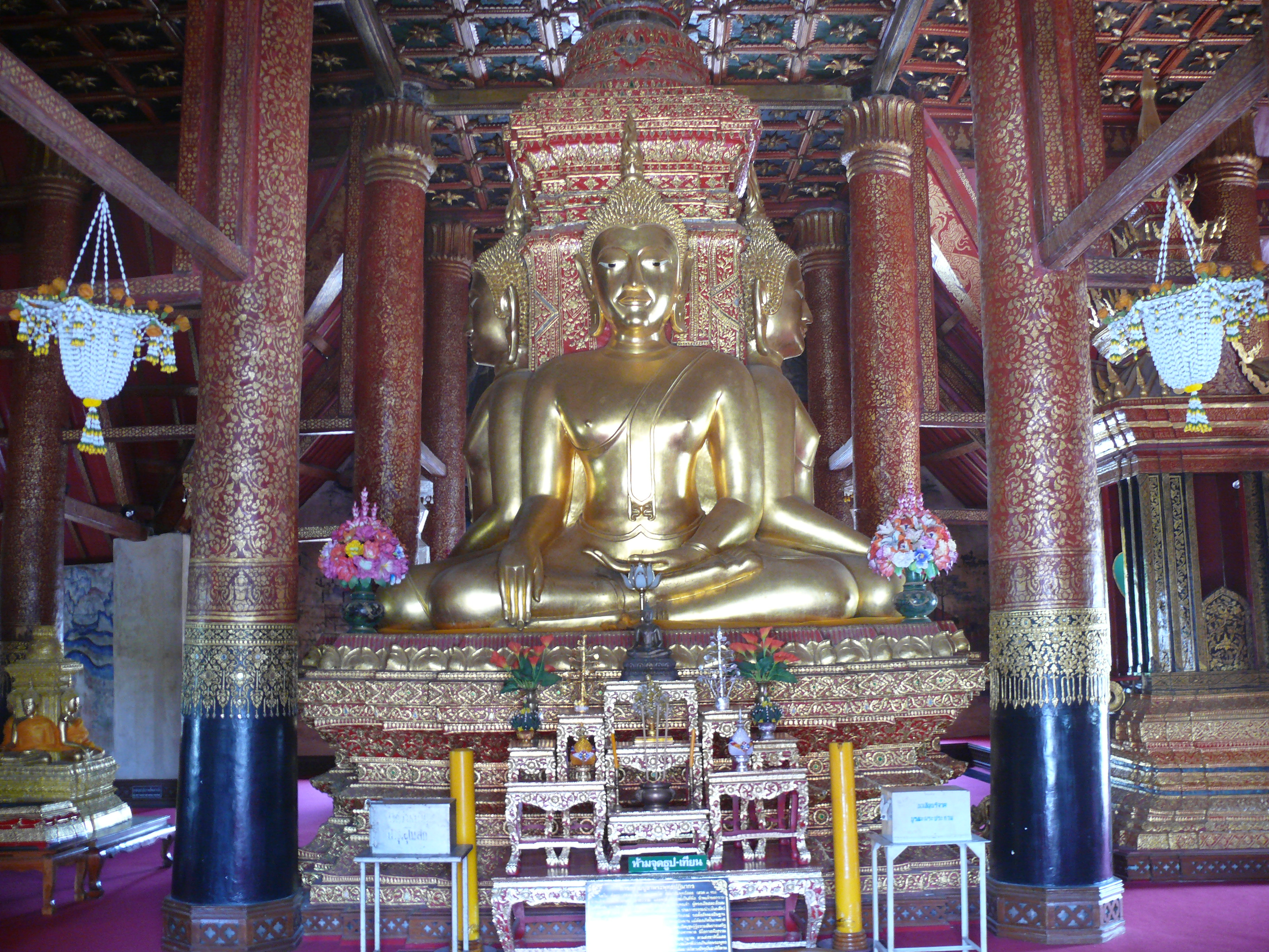 Wat_Phumin inside,_Nan